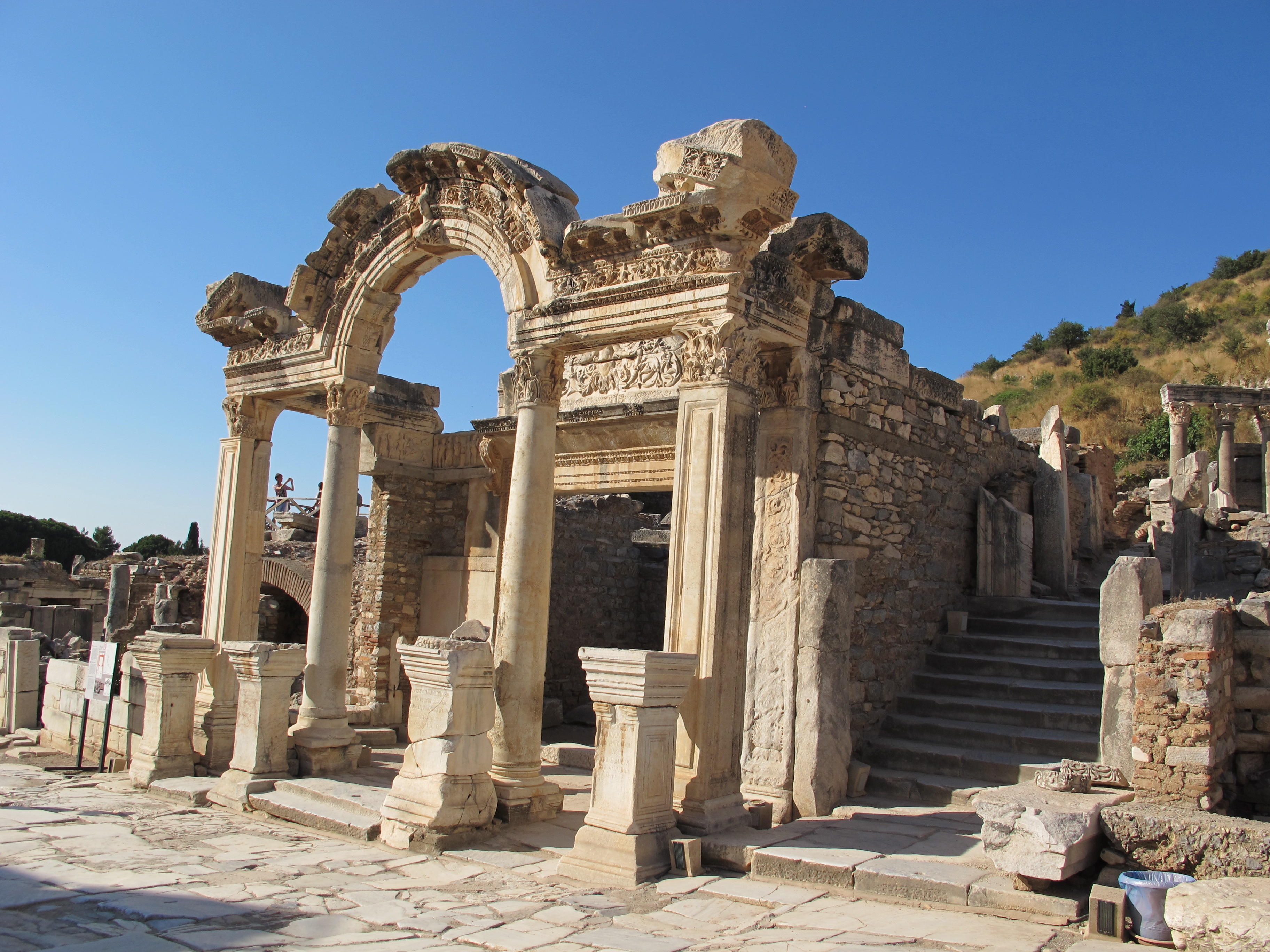 Efeso, tempio di adriano